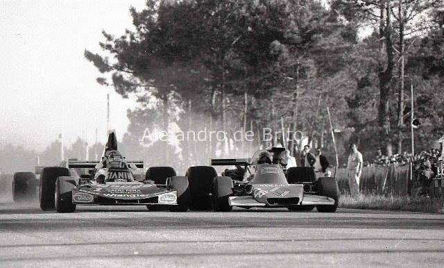 Pedro Passadore (Pianetto-Dodge) y Miguel Ángel Guerra (Berta-Torino), El Pinar (Uruguay), MAF1 1977.